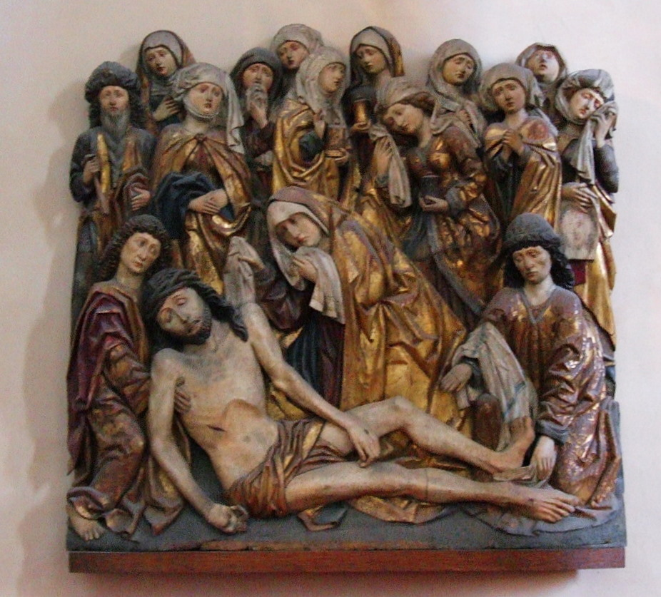 Erfurter Dom, Erfurt, Germany